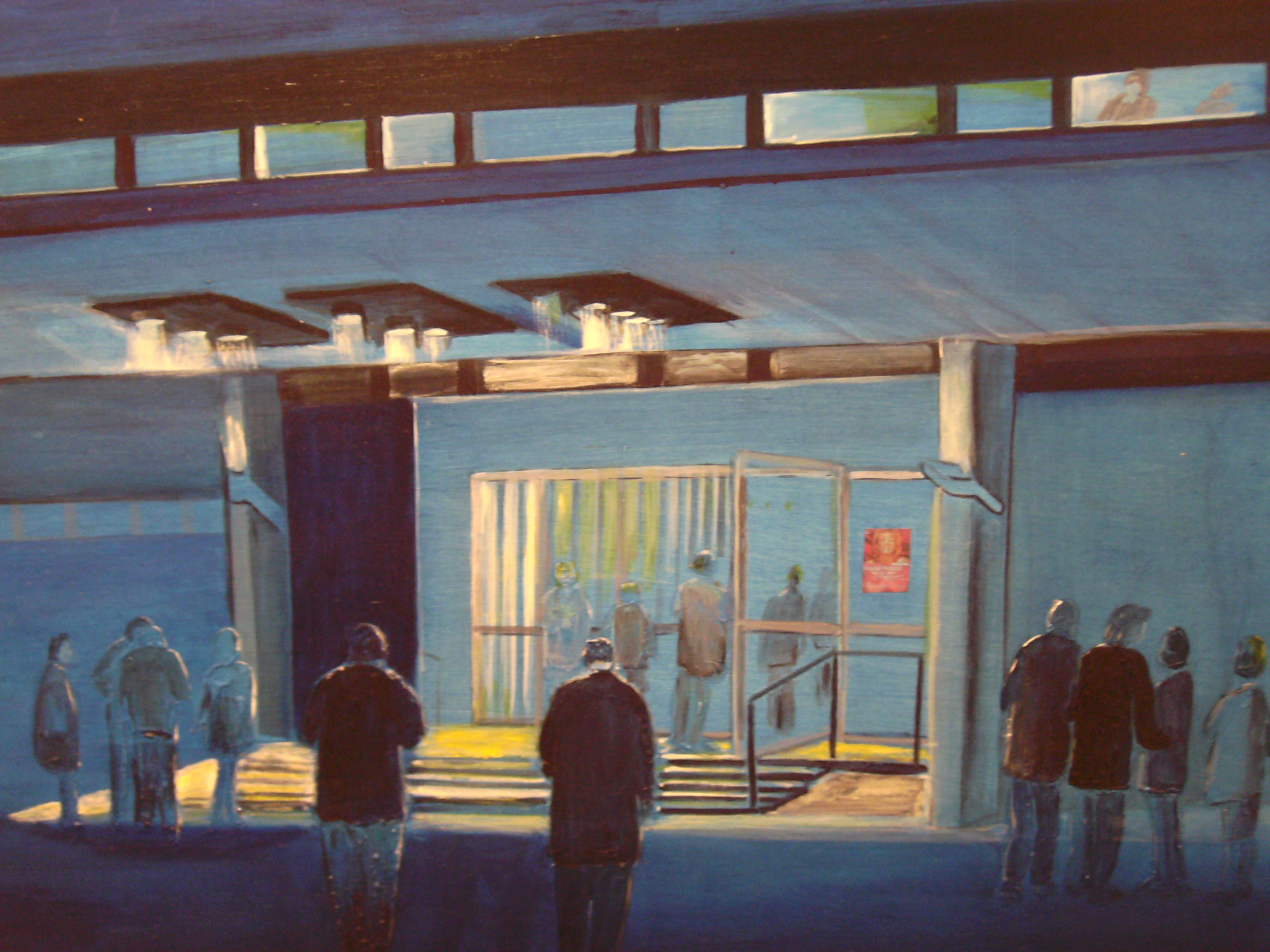 Gemälde von Ingrid Peters "Congresshalle Saarbrücken"